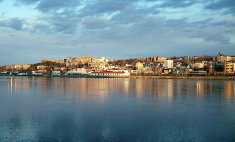 Panorama de Chicoutimi